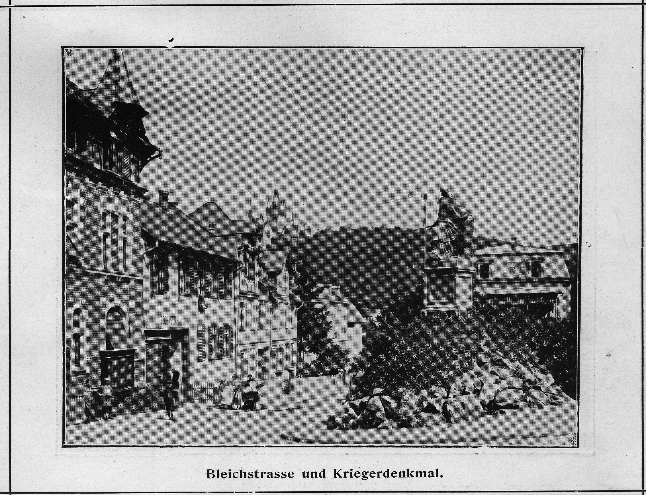 Bleichstrasse und Kriegerdenkmal XVIII_1689 Bild 7, Bildband von 1900, gescannt vom Hessischen Hauptstaatsarchiv